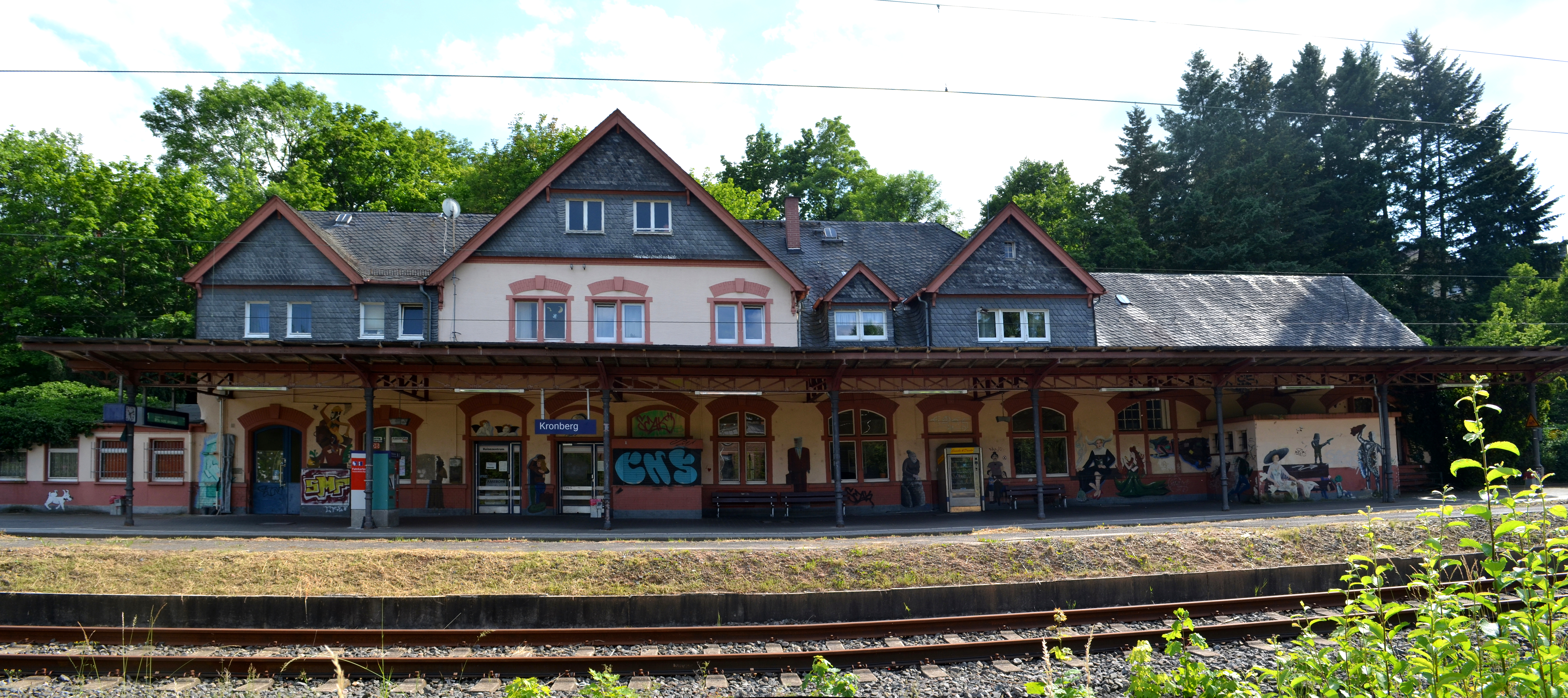 Kronberg, Bahnhofsempfangsgebäude